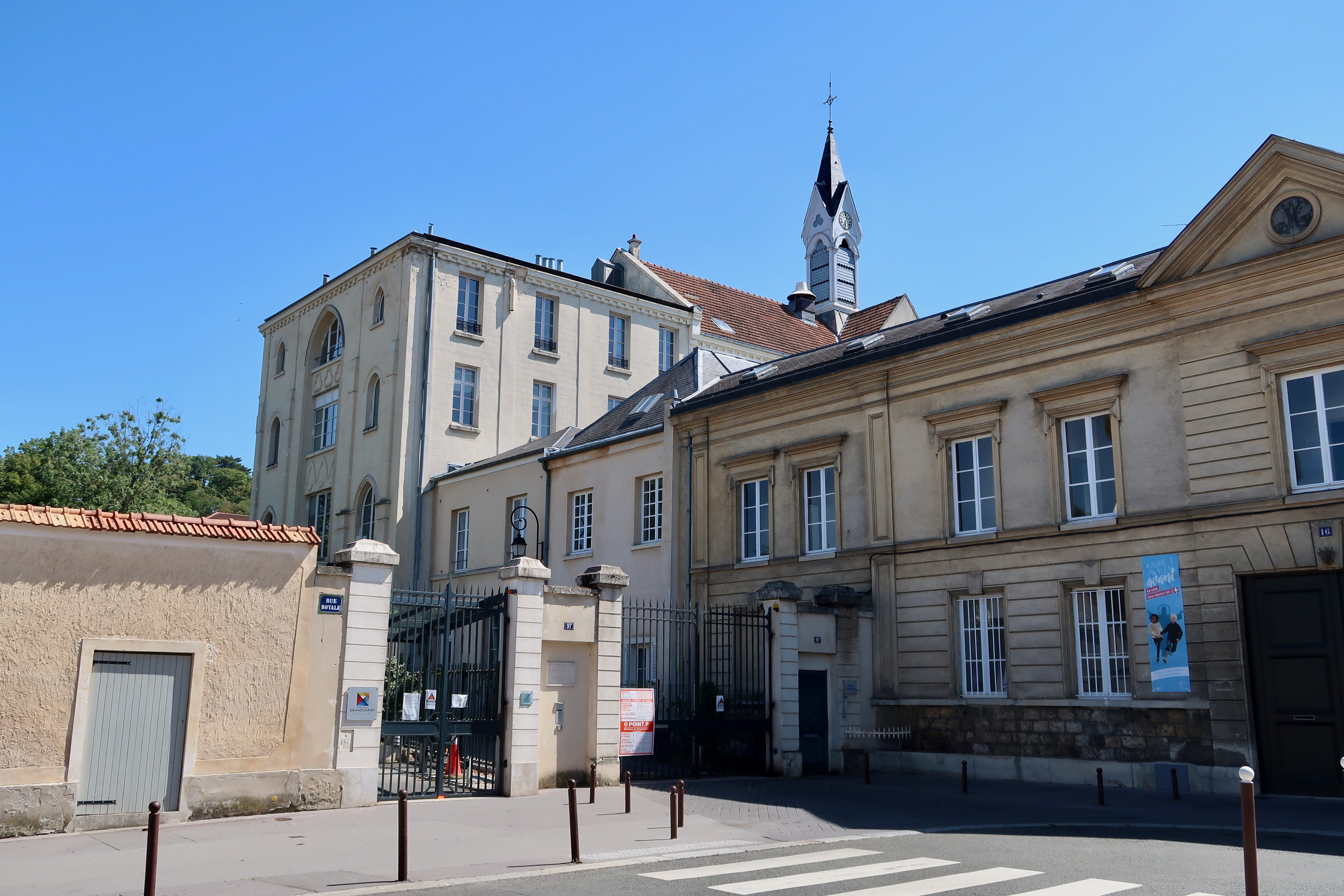 Lycée privé Notre-Dame-du-Grandchamp, 97 rue Royale à Versailles (Yvelines).